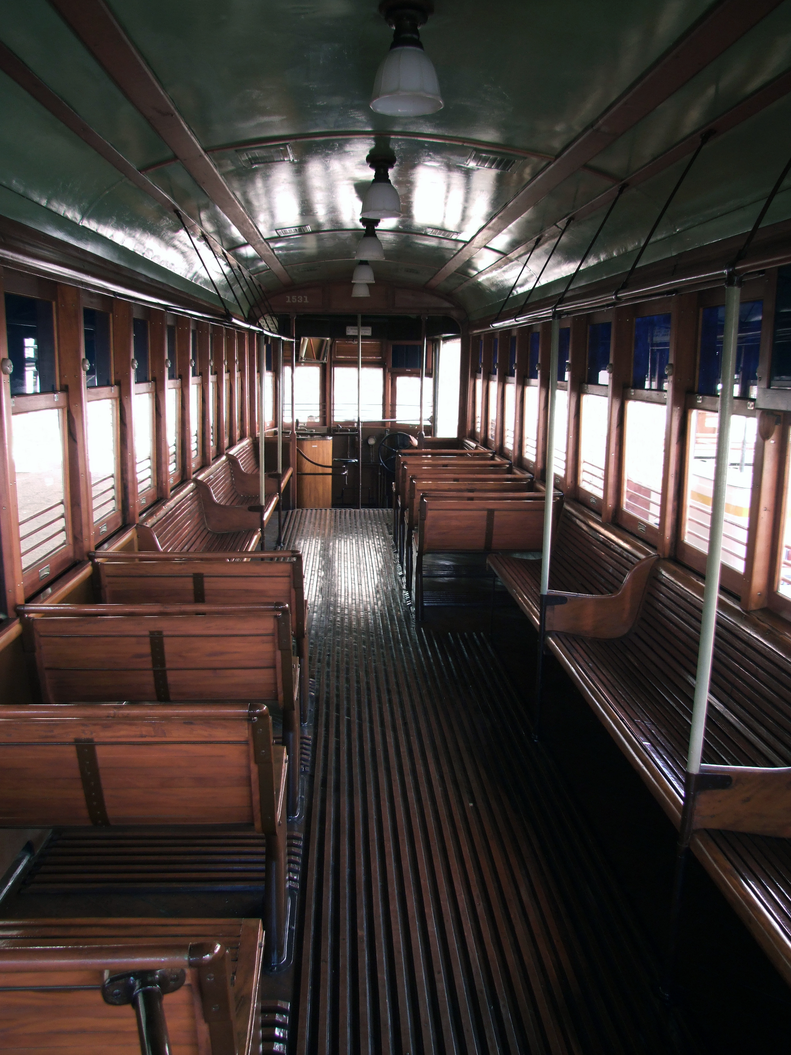 Interior de madeira dos bondes, transporte publico elétrico no seculo passado.